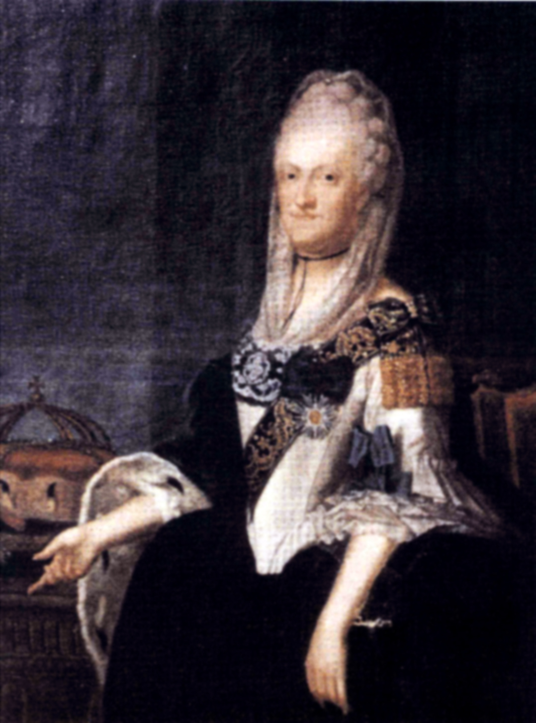 Maria Kunigunde von Sachsen (1740-1826), Fürstäbtissin von Essen und Äbtissin von Thorn, zeitgenössisches Ölgemälde